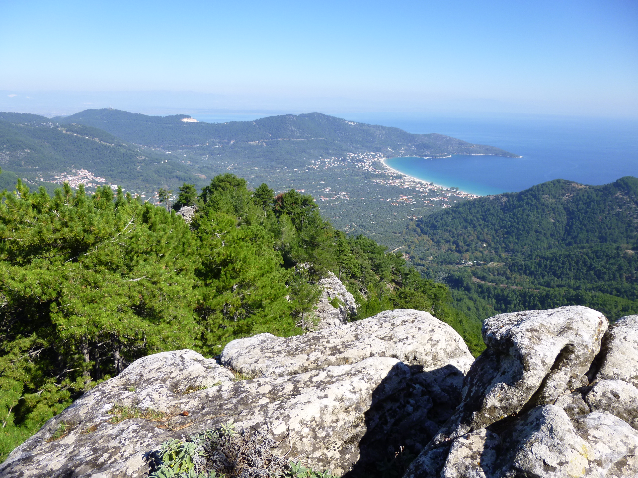 Blick auf die Ortschaften Potamia und Skala Potamia; griechische Insel Thassos. Die Orte liegen im Nordosten der Insel.